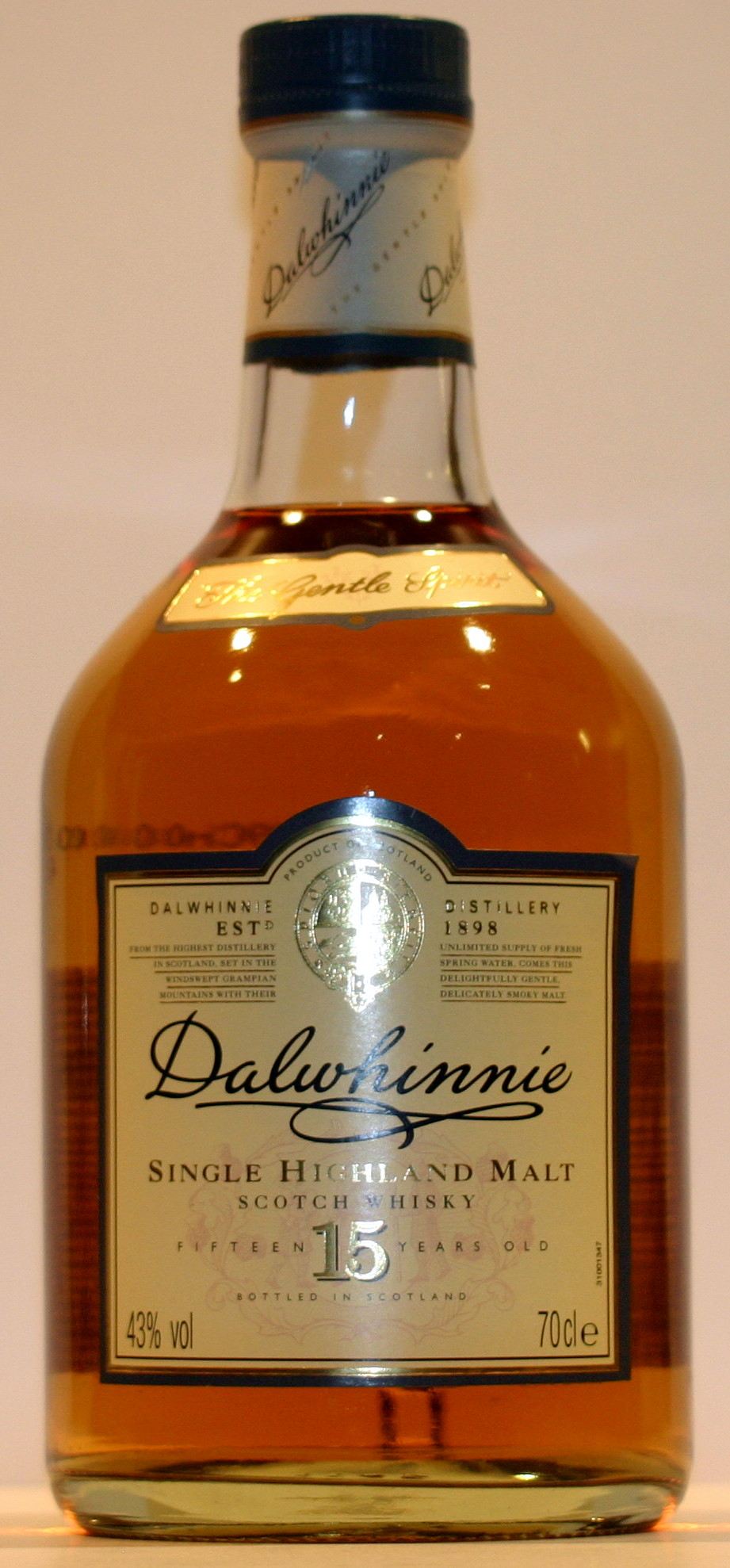 Dalwhinnie_Single_Highland_Malt_15_years_old